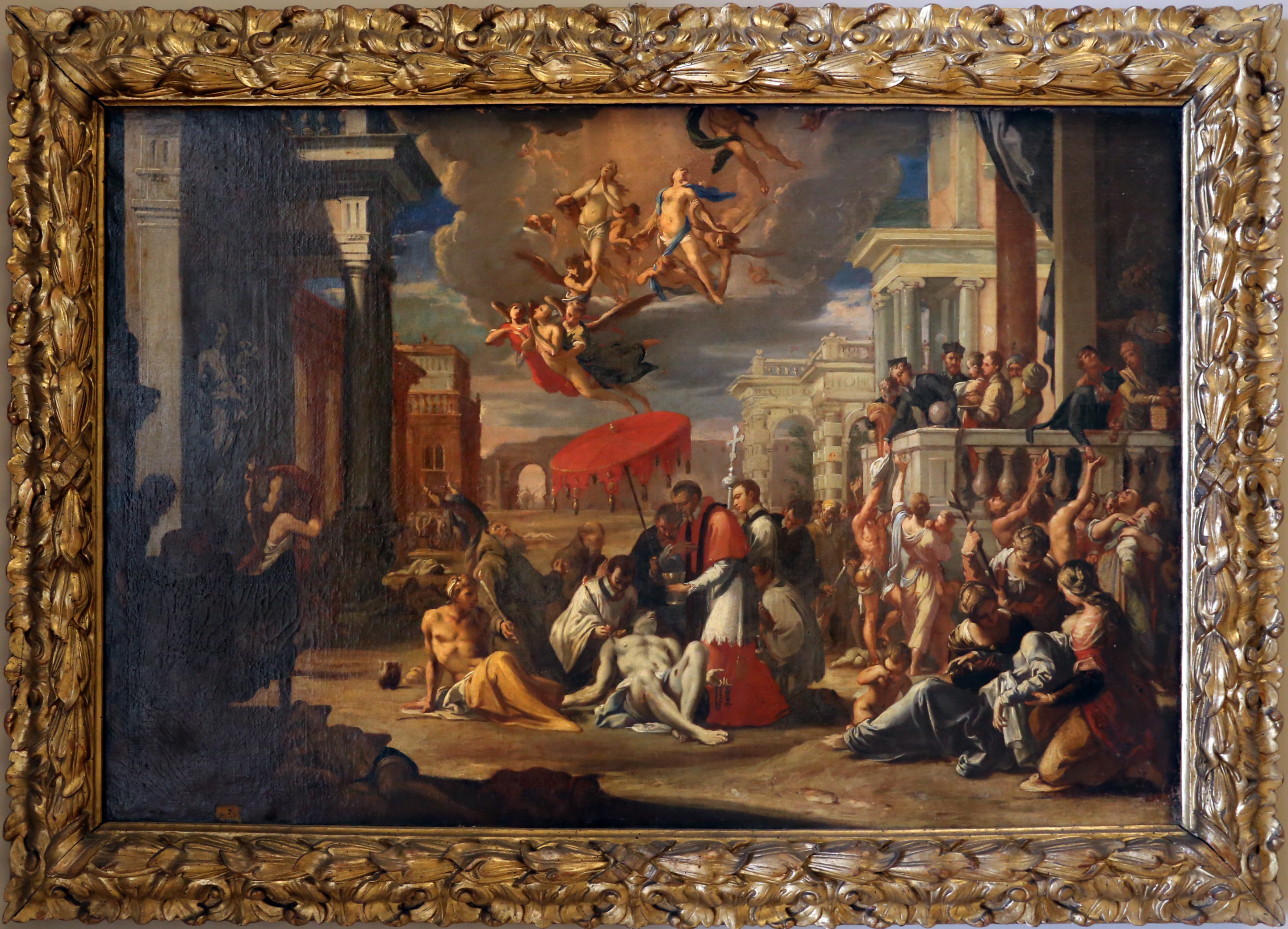 Palazzo dei Musei (Modena) This is a photo of a monument which is part of cultural heritage of Italy.